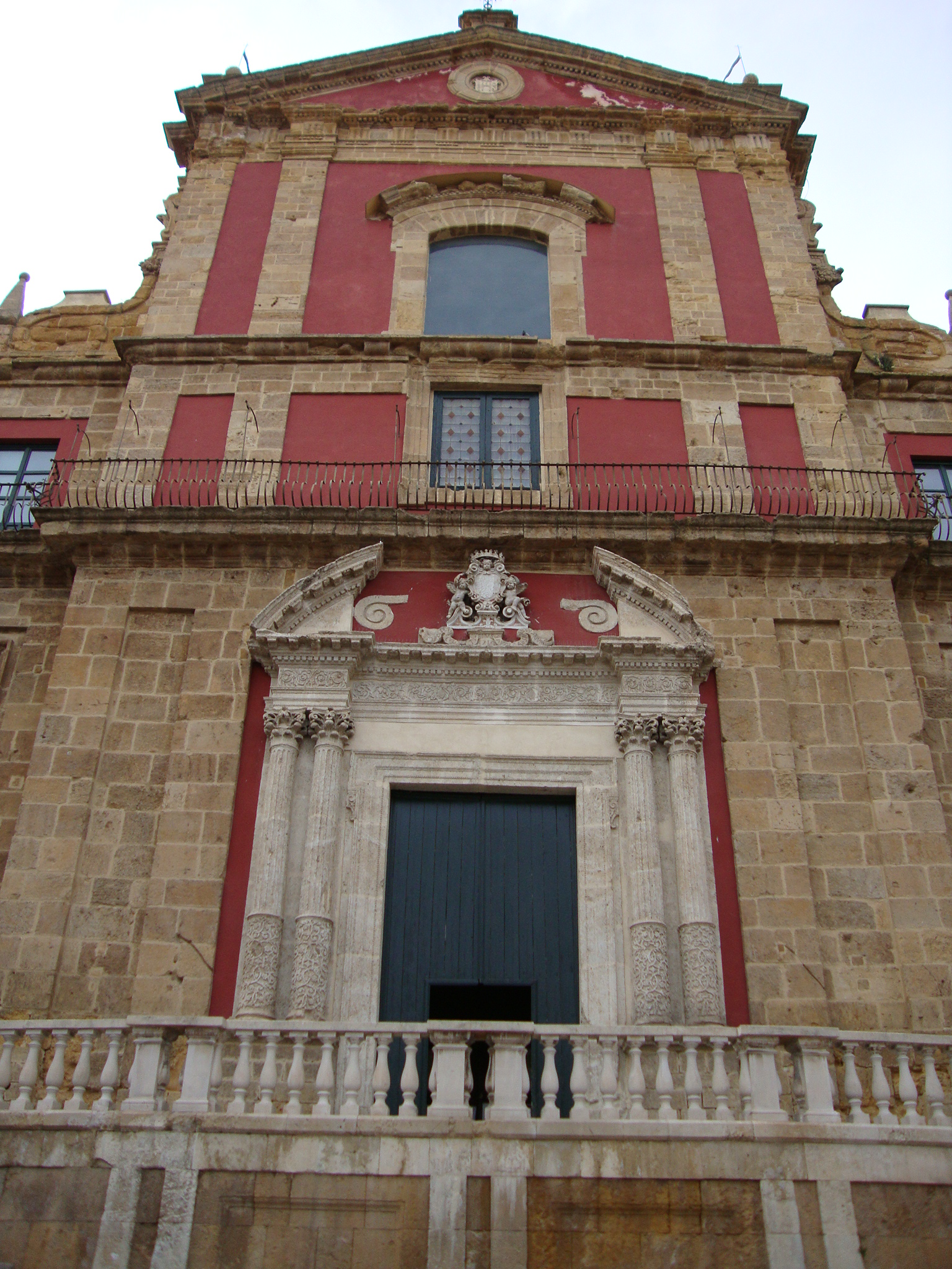 Facciata principale della chiesa di Sant' Agata al Collegio di Caltanissetta. Autore: Insider93